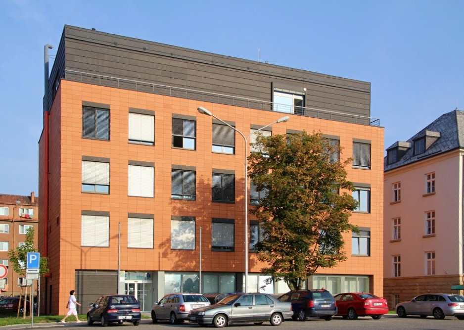 Zdravotnická záchranná služba Olomouckého kraje. Ředitelství, Zdravotnické operační středisko a Výjezdová základna, Aksamitova 557/8,779 00 Olomouc